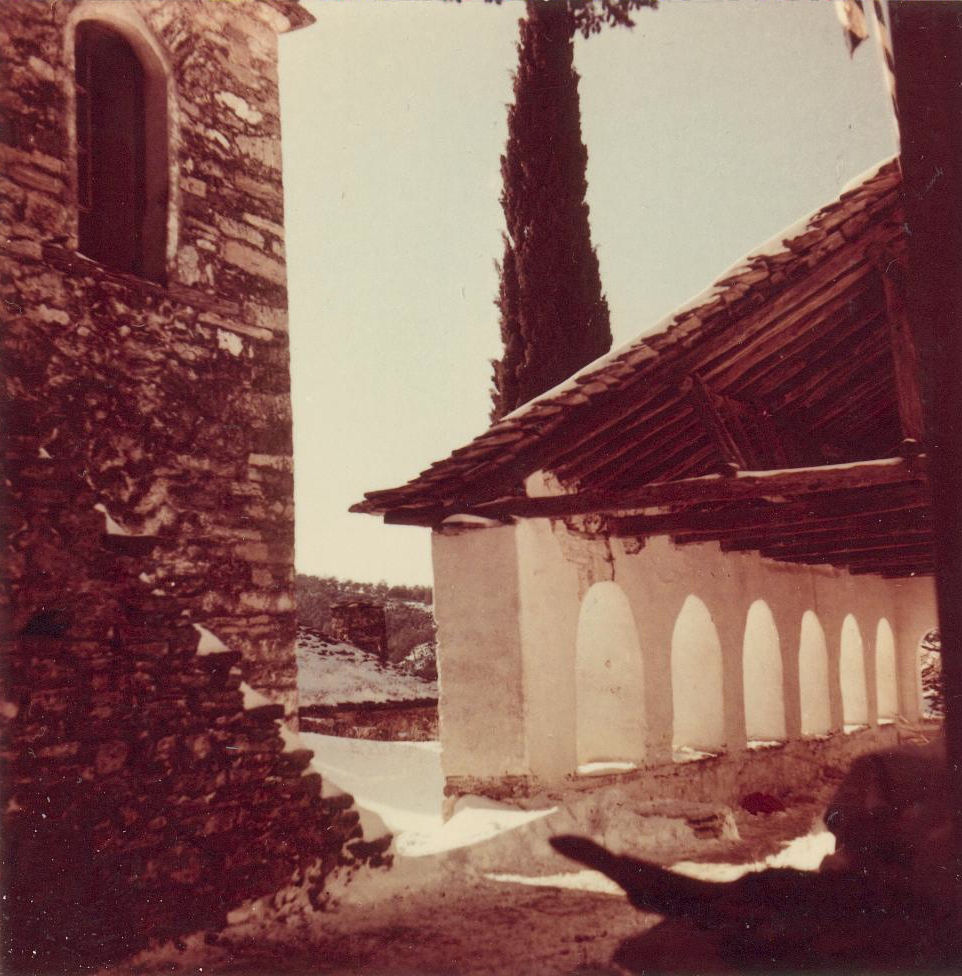 Kirchenvorhalle (1956)